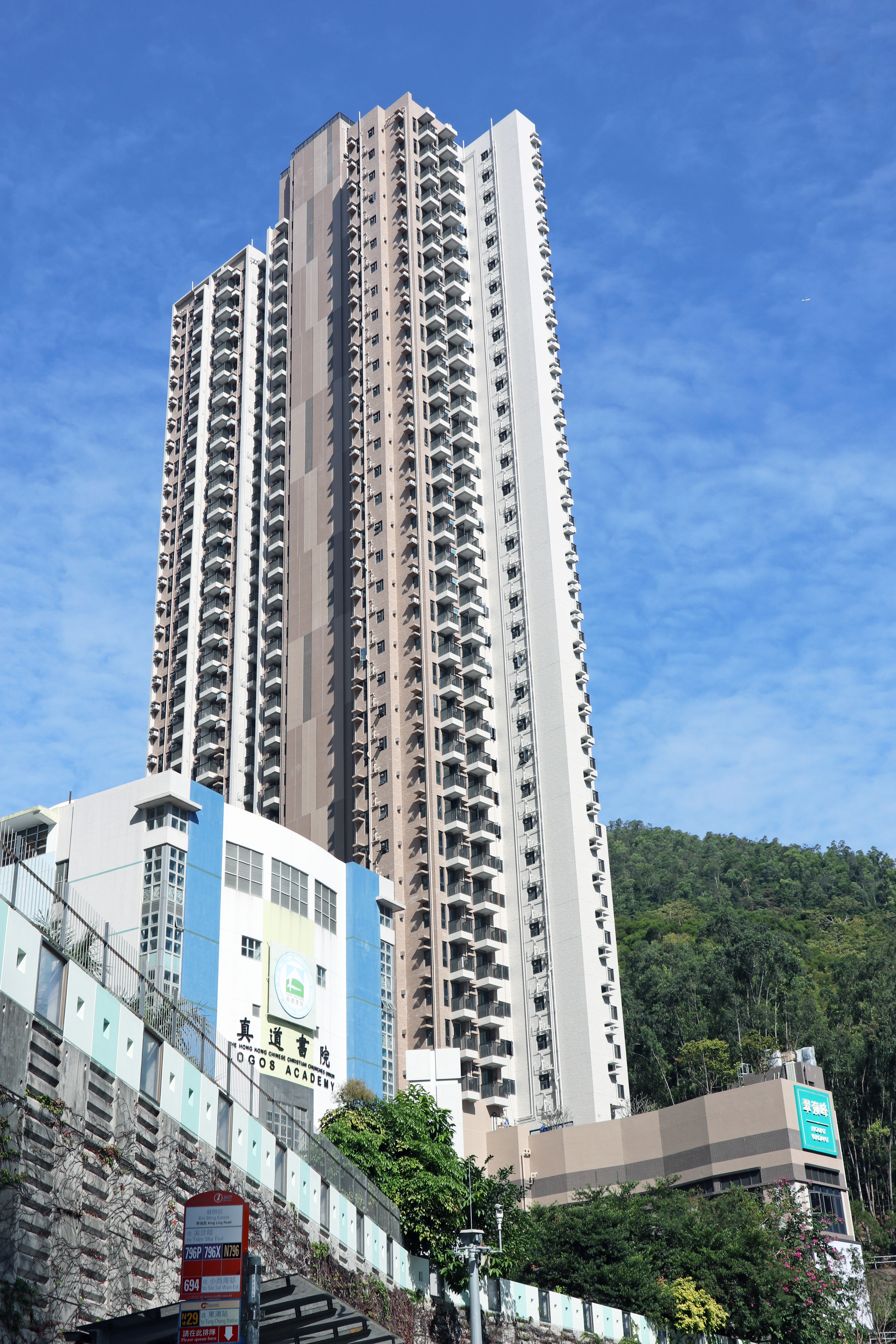 調景嶺翠嶺峰面向彩明苑一方